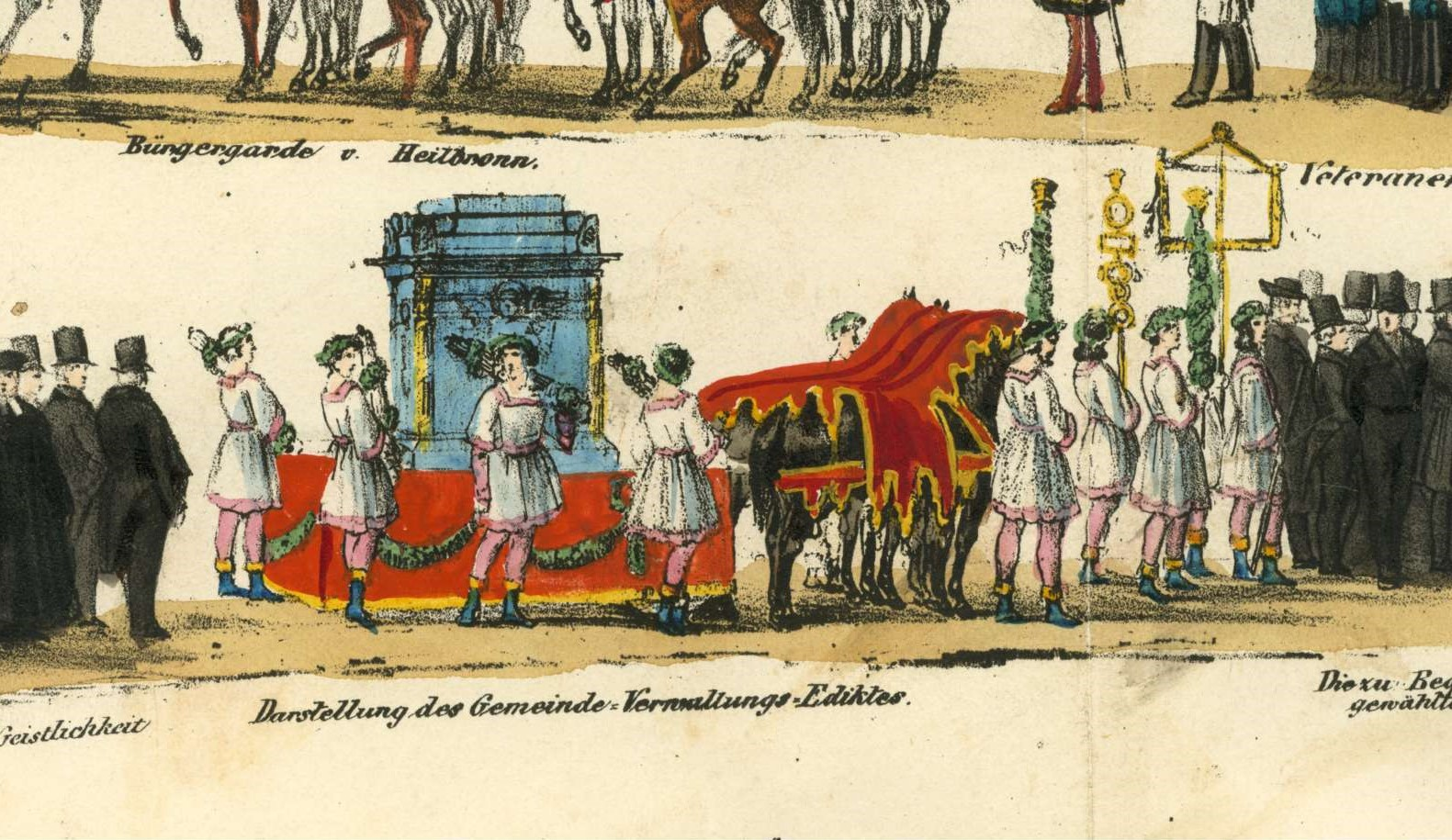 Festzug der Wuerttemberger 1841